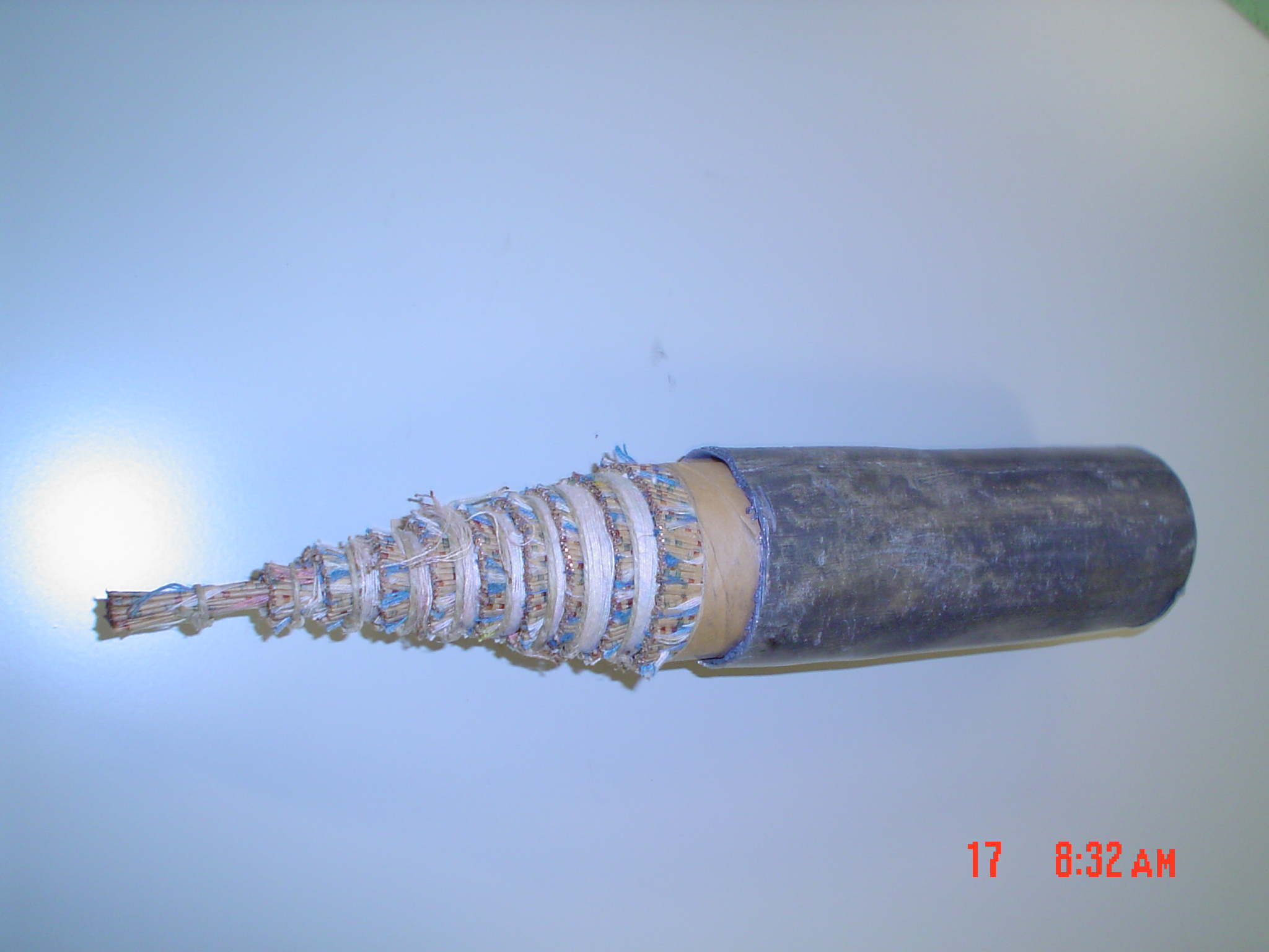 Stelotorda_plumboŝela_entira loka kablo kun paperaj kuseno kaj izolaĵo 315x4 kupraj konduktiloj